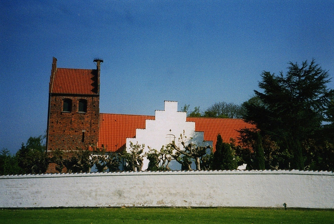 Søllerød Kirke, Søllerød Sogn, Rudersdal Kommune